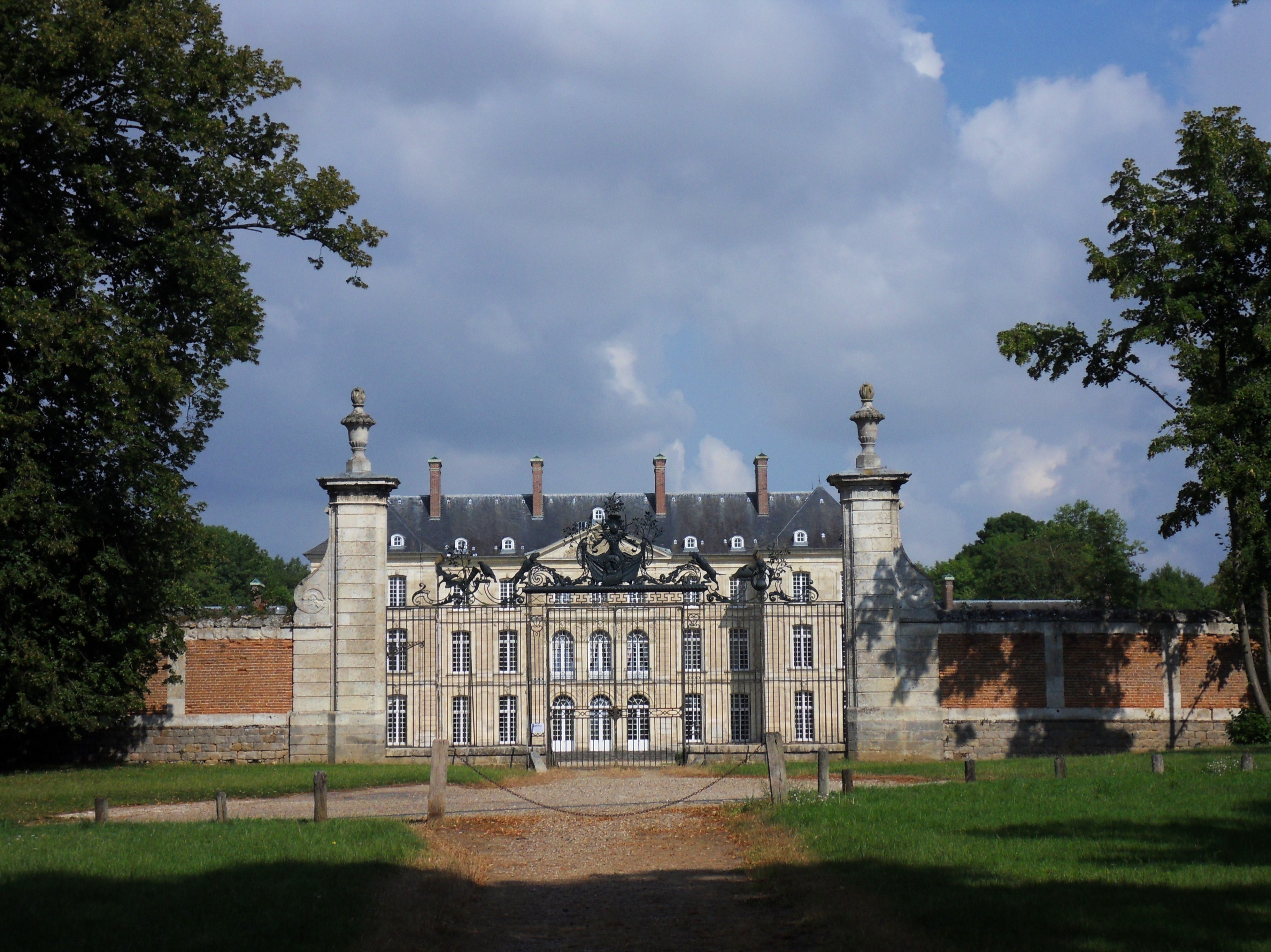 Le château de Bertangles, Somme, France